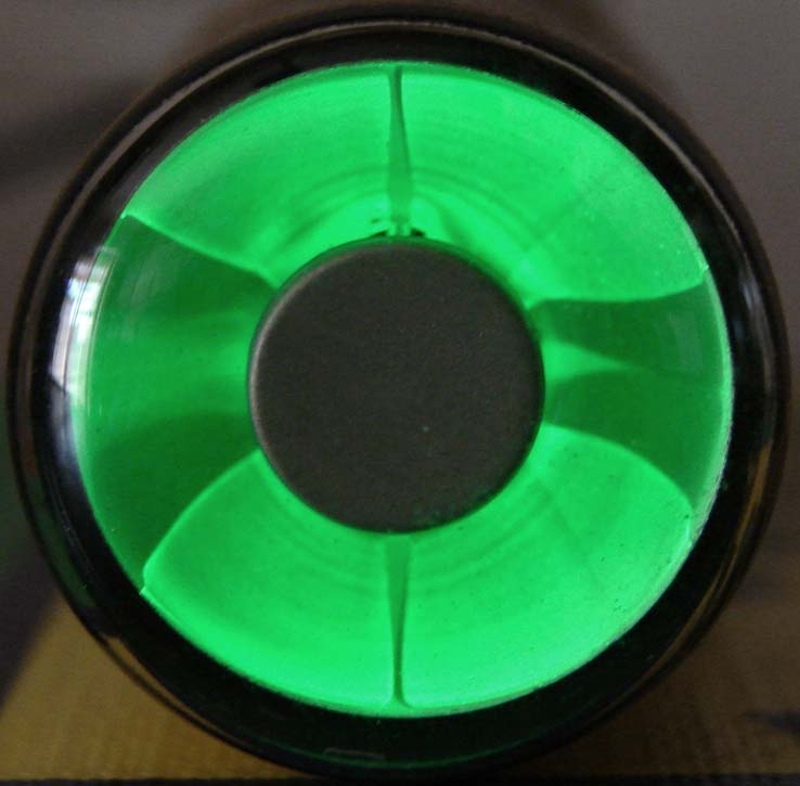 Magisches Auge EM34, Leuchtschirm in Betrieb